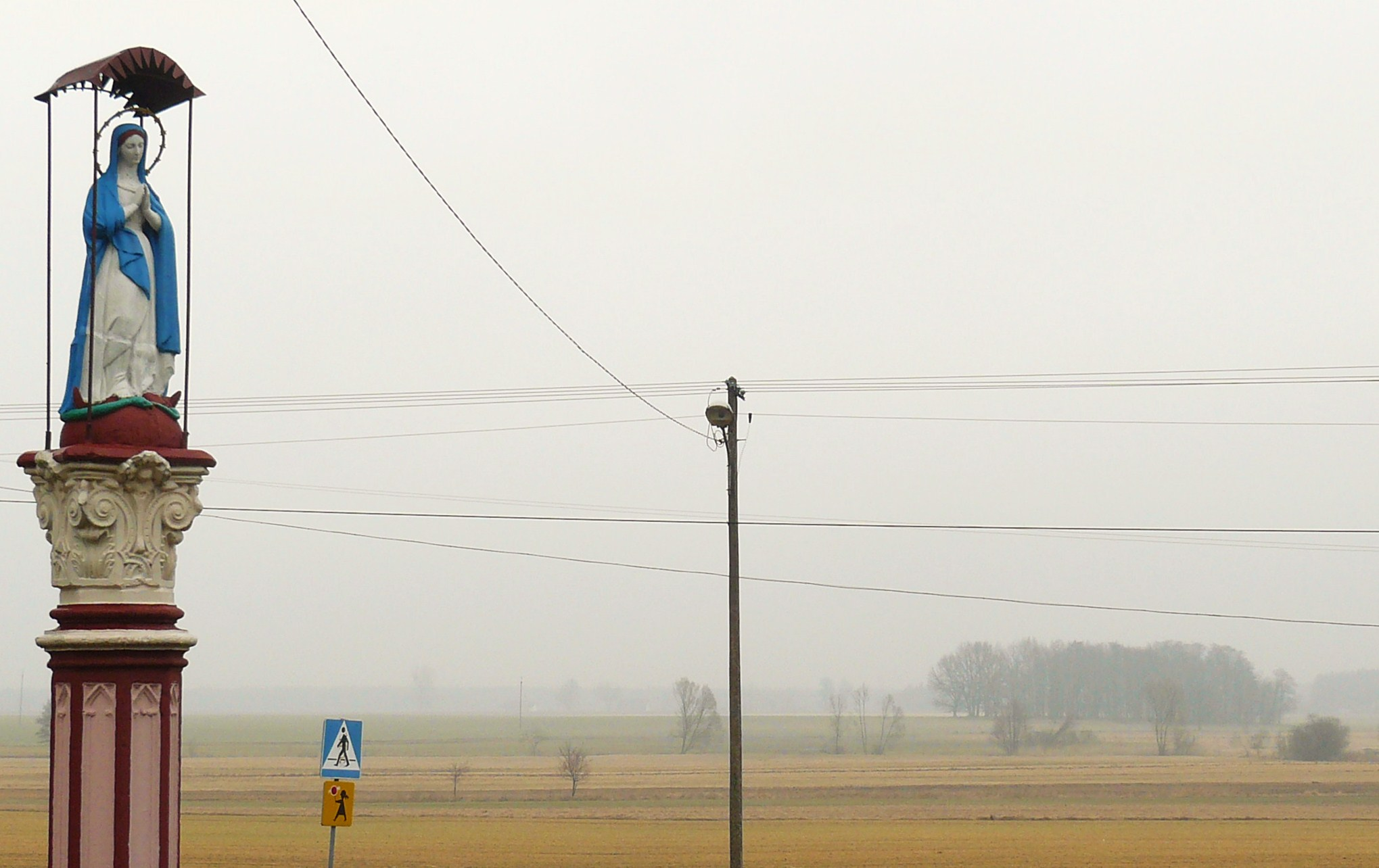 Budziszewko, kapliczka przy kościele drewn.